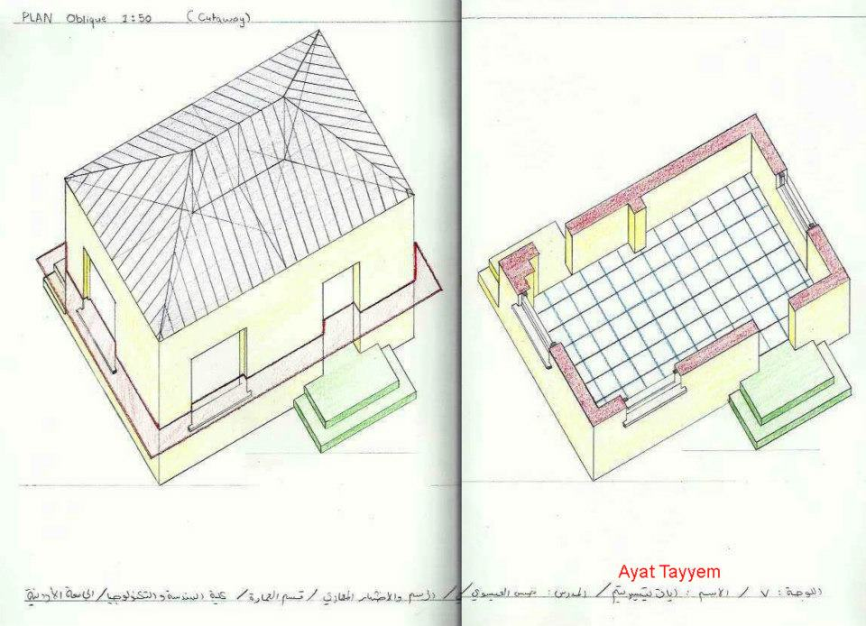 spaccato assonometrico di una ambiente architettonico